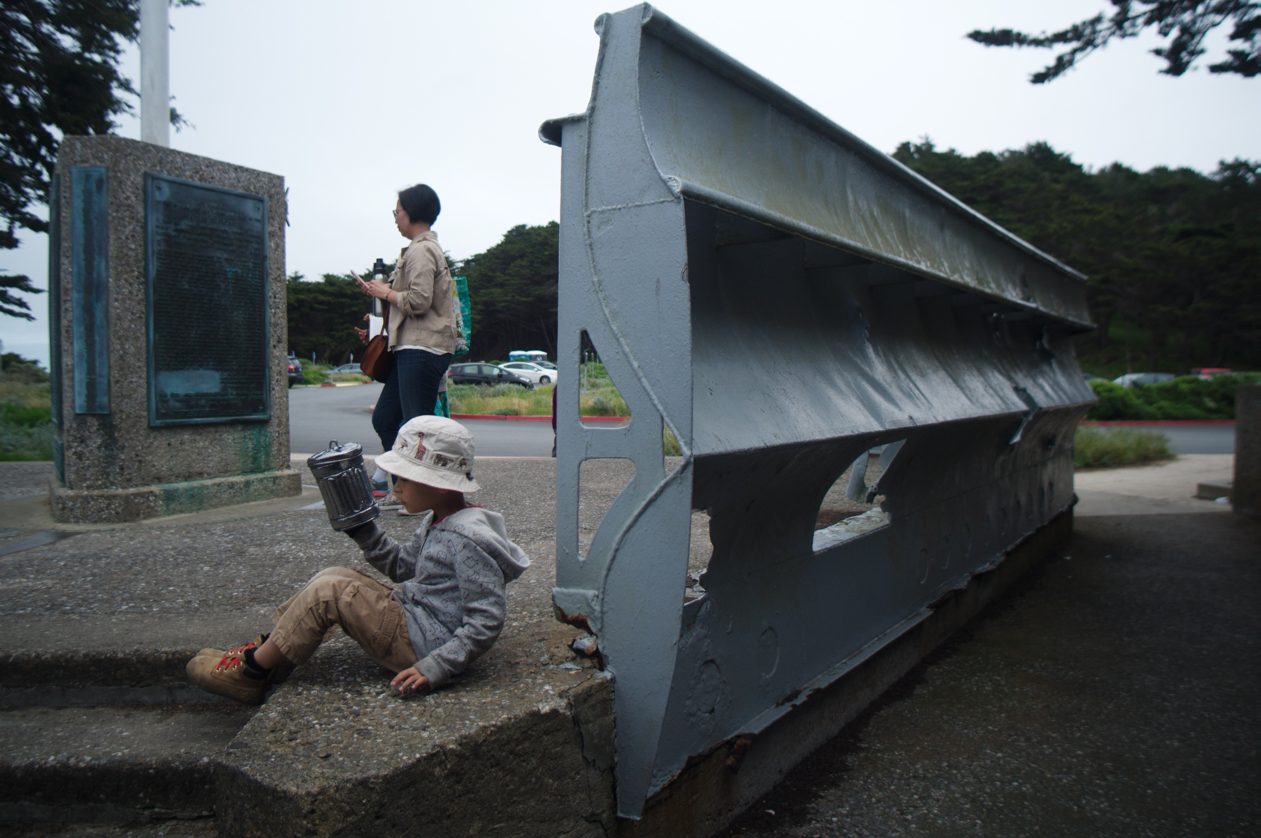 Angles on angles.